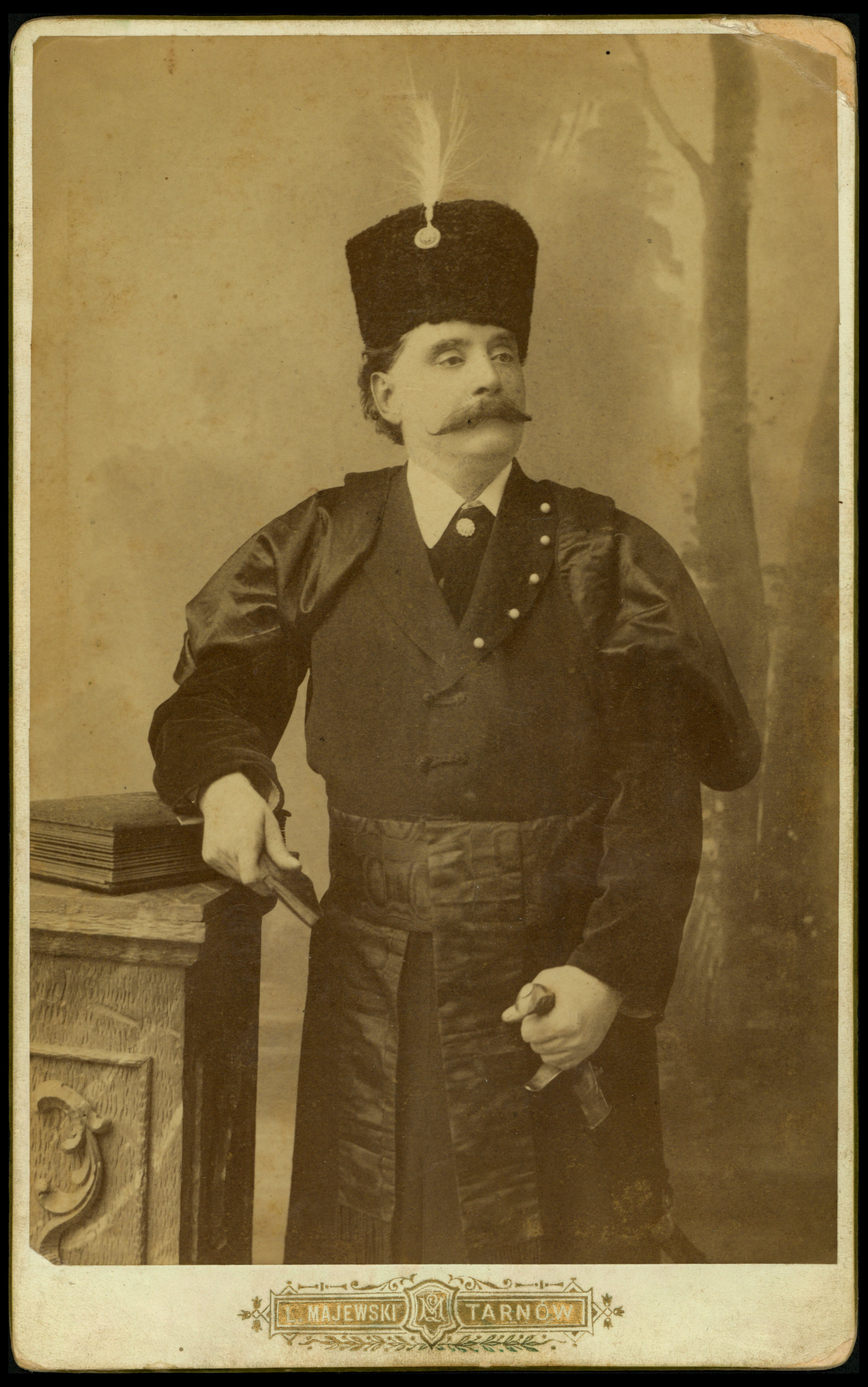 Stanisław Konopka, ok. 1892 r.